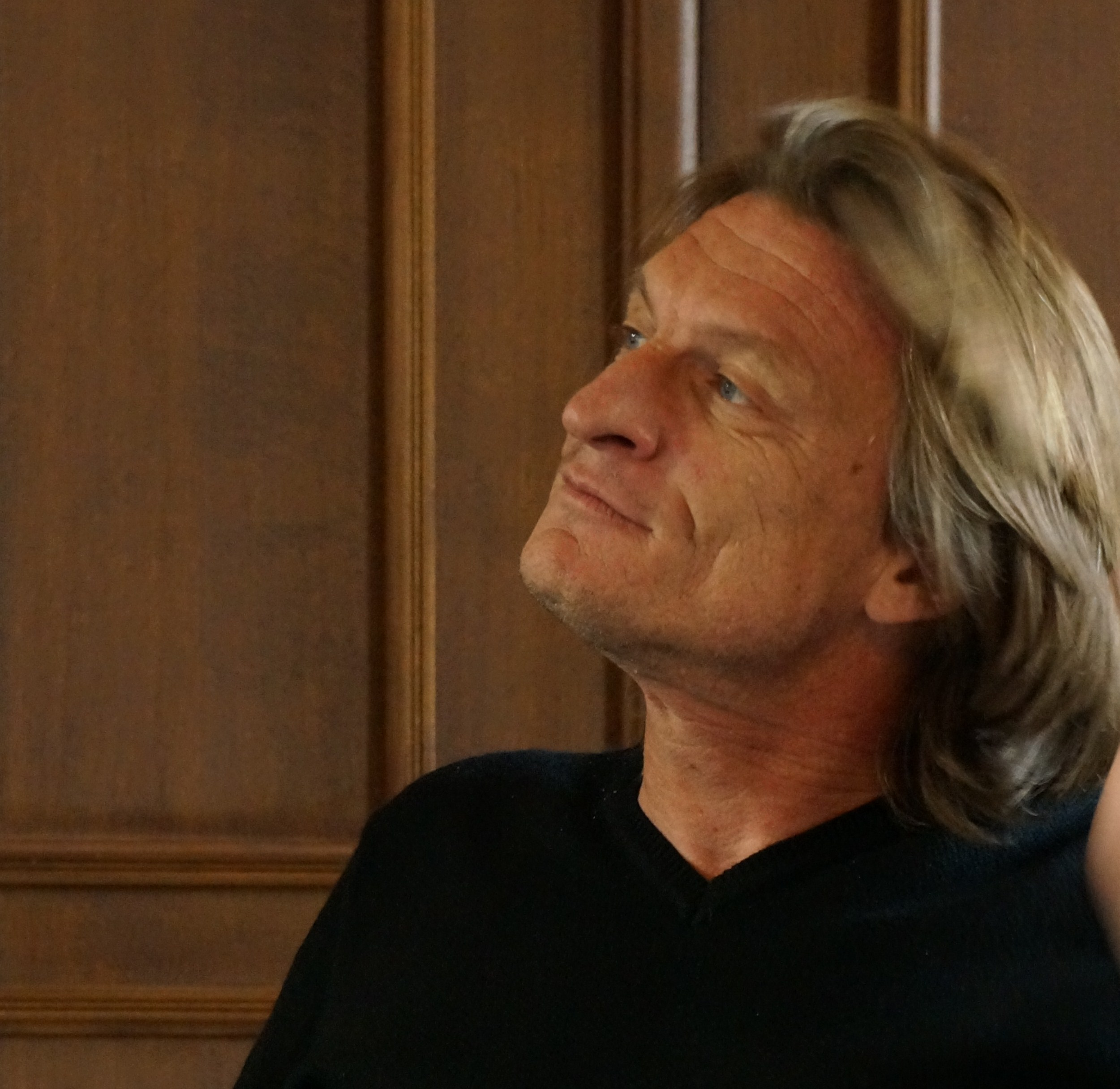 Marcus_Malte au festival Interpol'art .